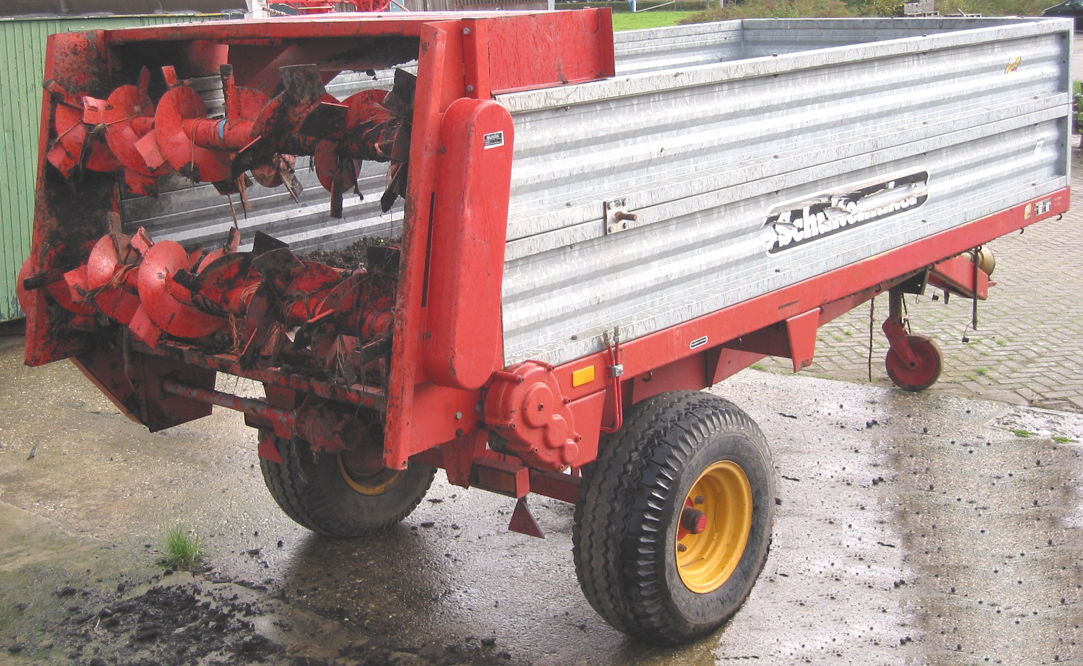 Møgspreder med kombination af snegle og knive i spredeaggregatet